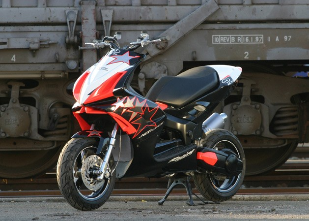 getunde jetforce